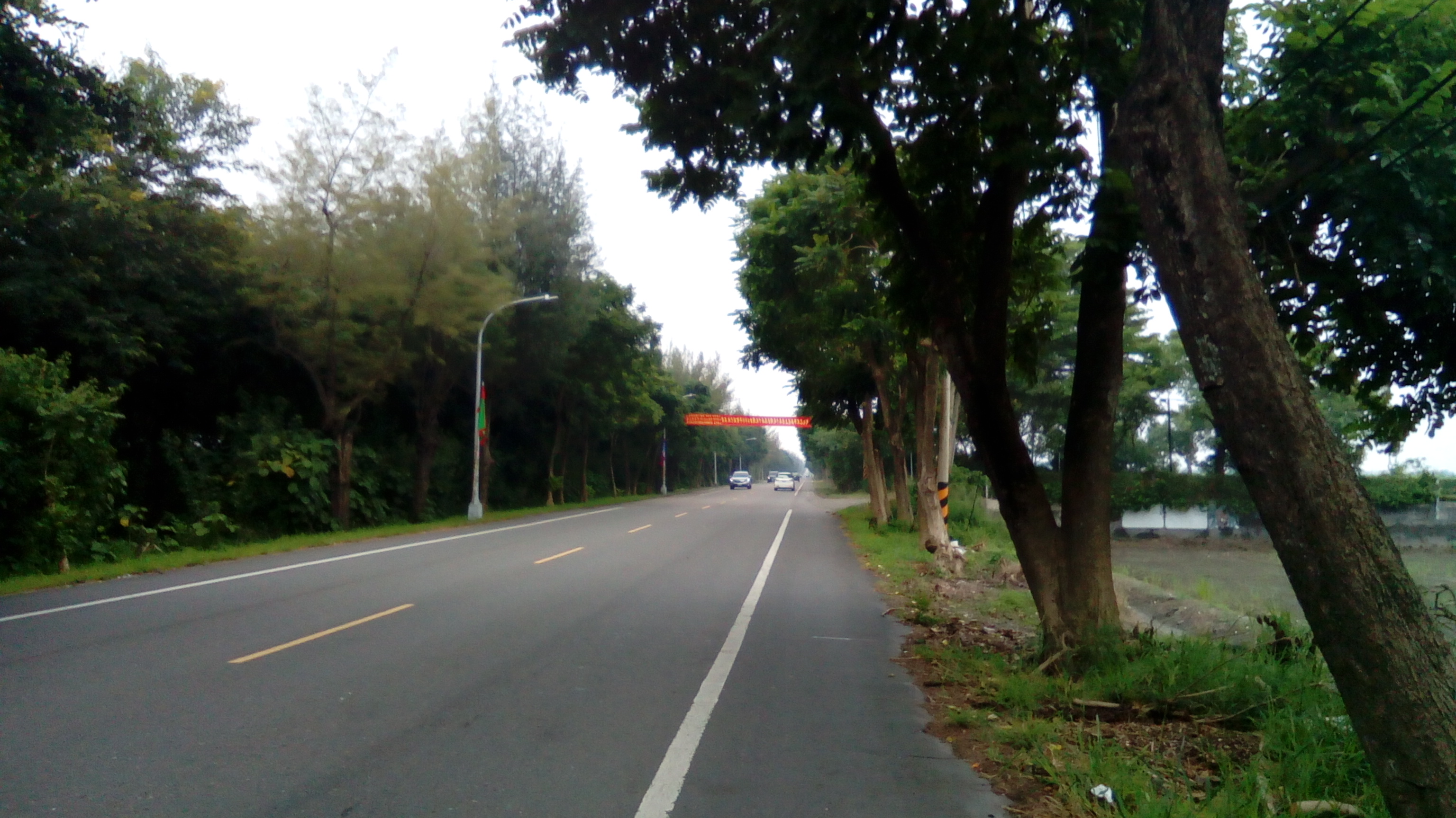 位於水林和北港交界之處